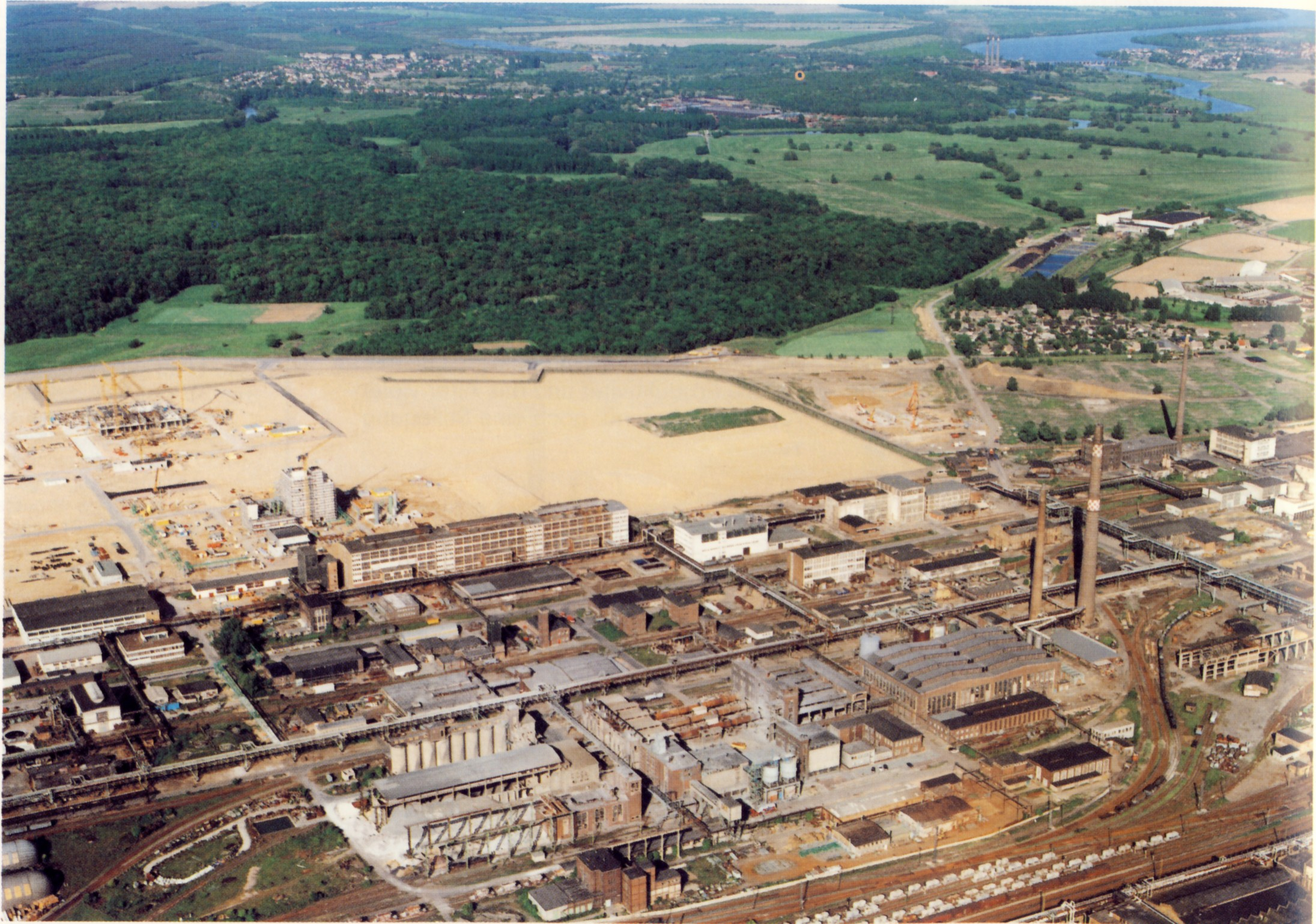 Chemiepark Bitterfeld-Wolfen, auf der Freifläche wird das Werk der Bayer Bitterfeld GmbH aufgebaut